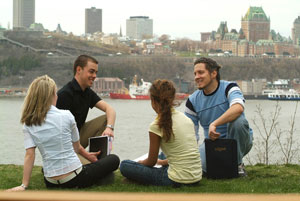 La ville de Lévis ainsi que la ville de Québec en arrière-plan